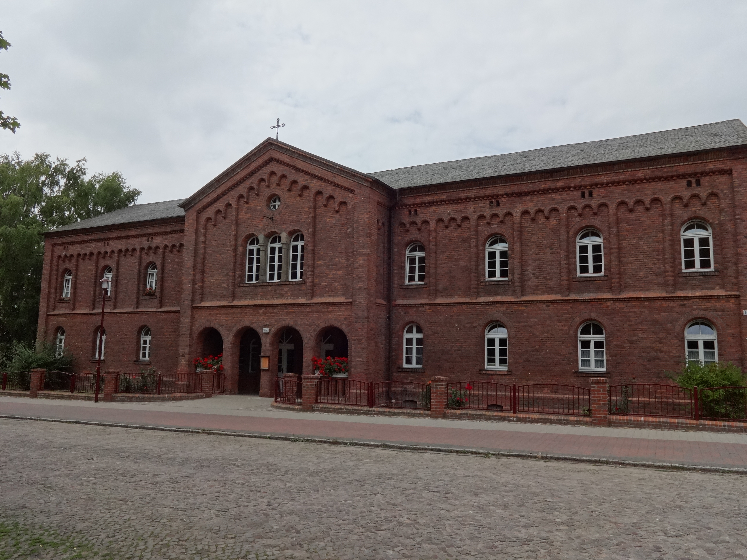 Das 1851 errichtete Hospital in Pasewalk trägt seinen Namen nach den roten Ziegelsteinen und dient heute als Wohnraum für ältere Menschen.